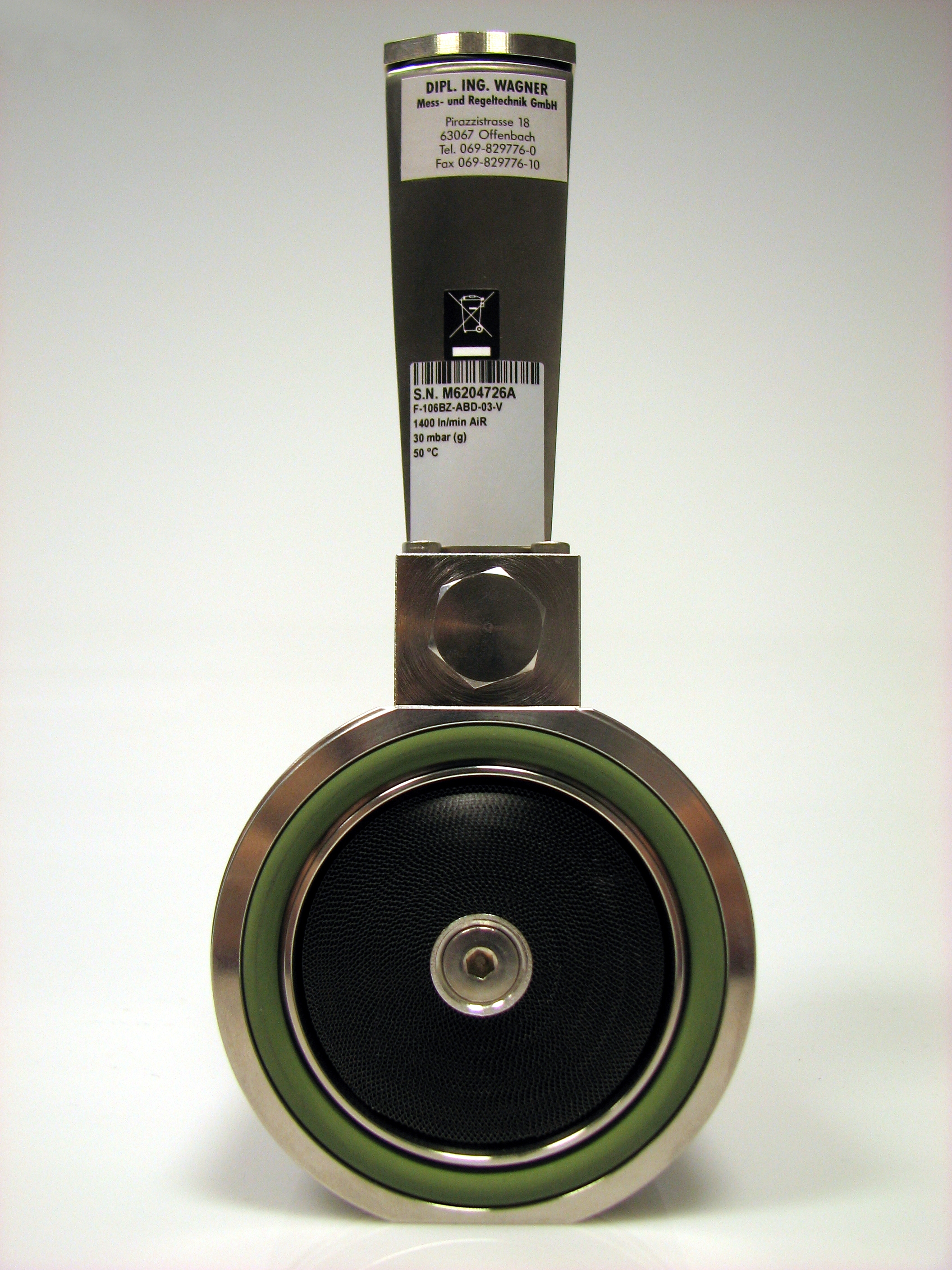 Einlassseite eines Luftmassenmesser, Intlet of a air flow meter